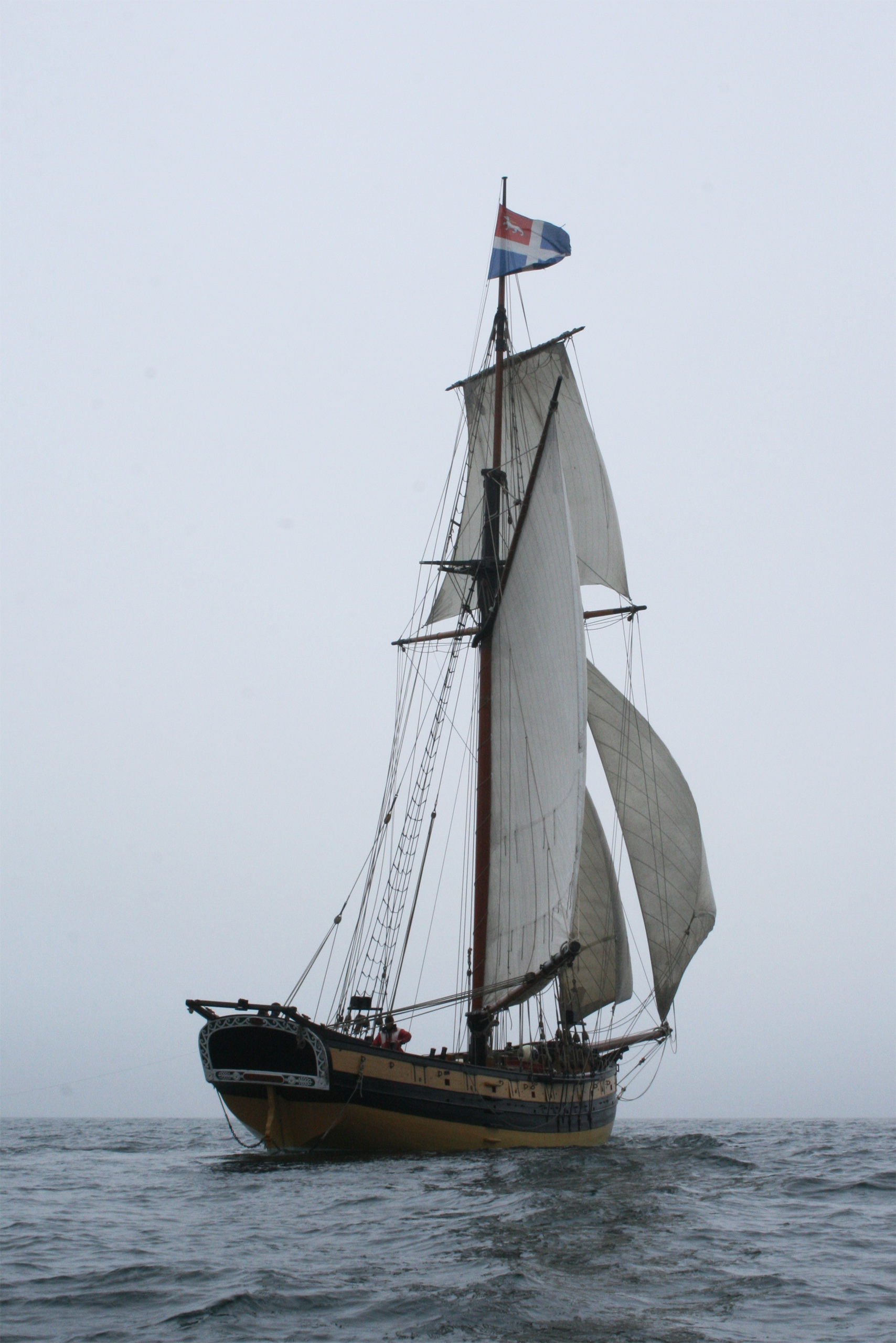 Le Renard, côtre à hunier du corsaire malouin Robert Surcouf.